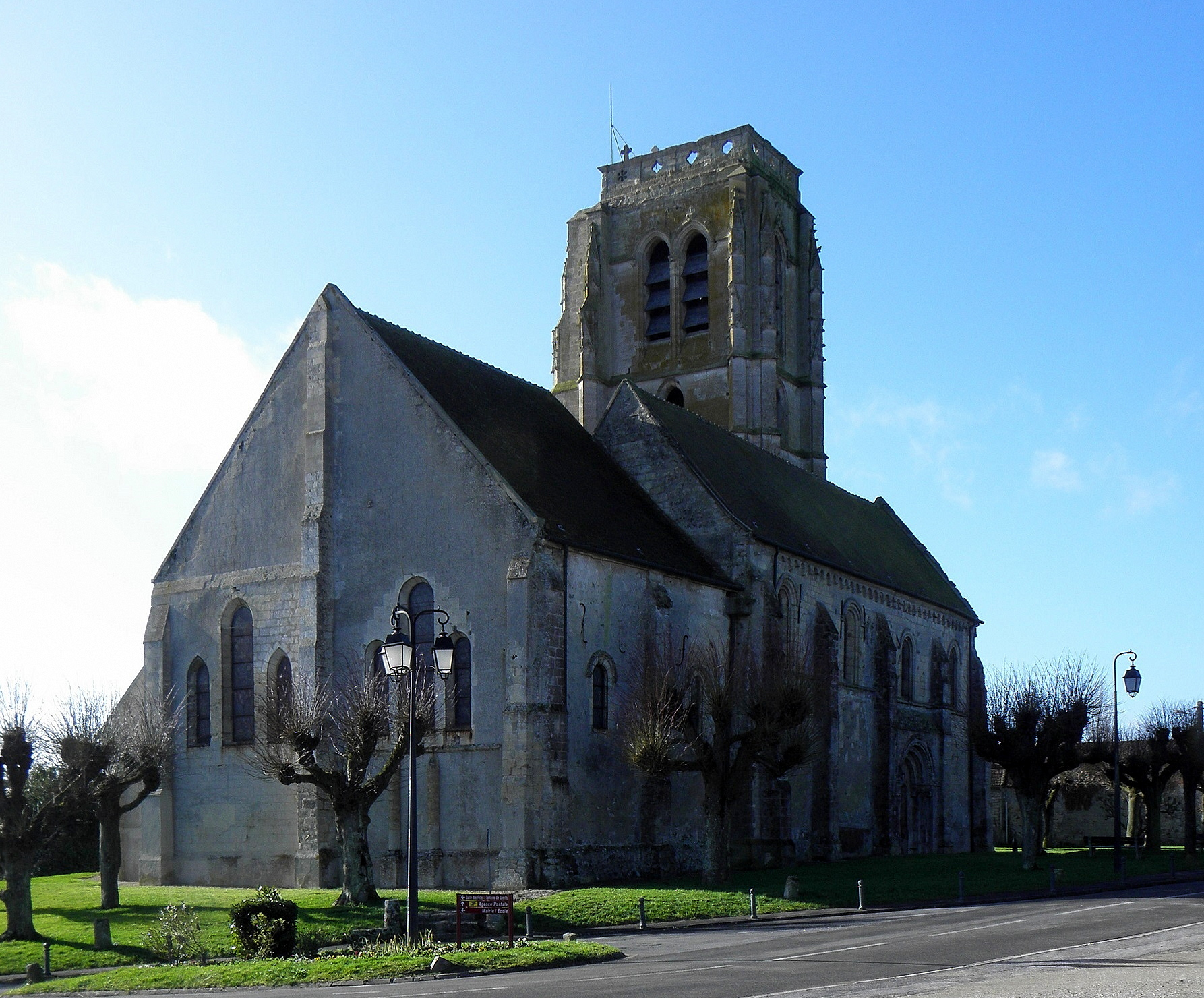 Église de l'Assomption de la Vierge de May-en-Multien (77). Chevet et flanc nord.